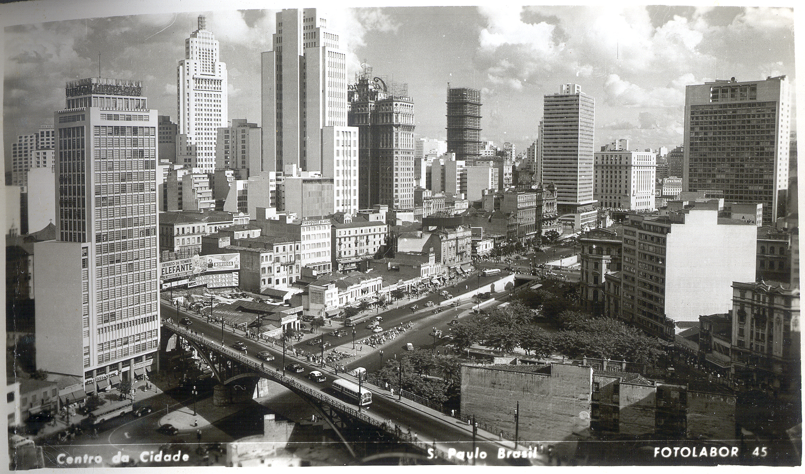 Obra que integra o acervo do Museu Paulista da USP. Coleção Werner Haberkorn